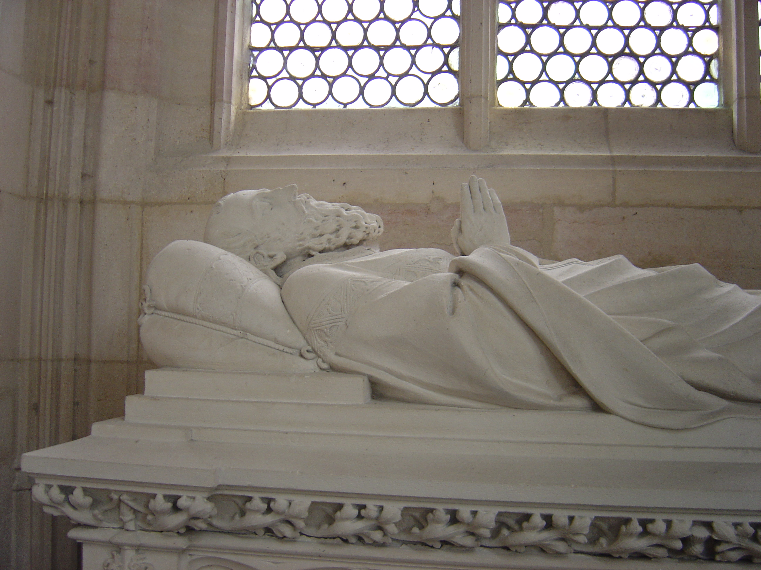 Tombeau de Simon Moycet (14..-1520) dans la basilique de Saint-Nicolas-de-Port, daté de 1892 et sculpté par Victor Huel en 1893. Détail du gisant.